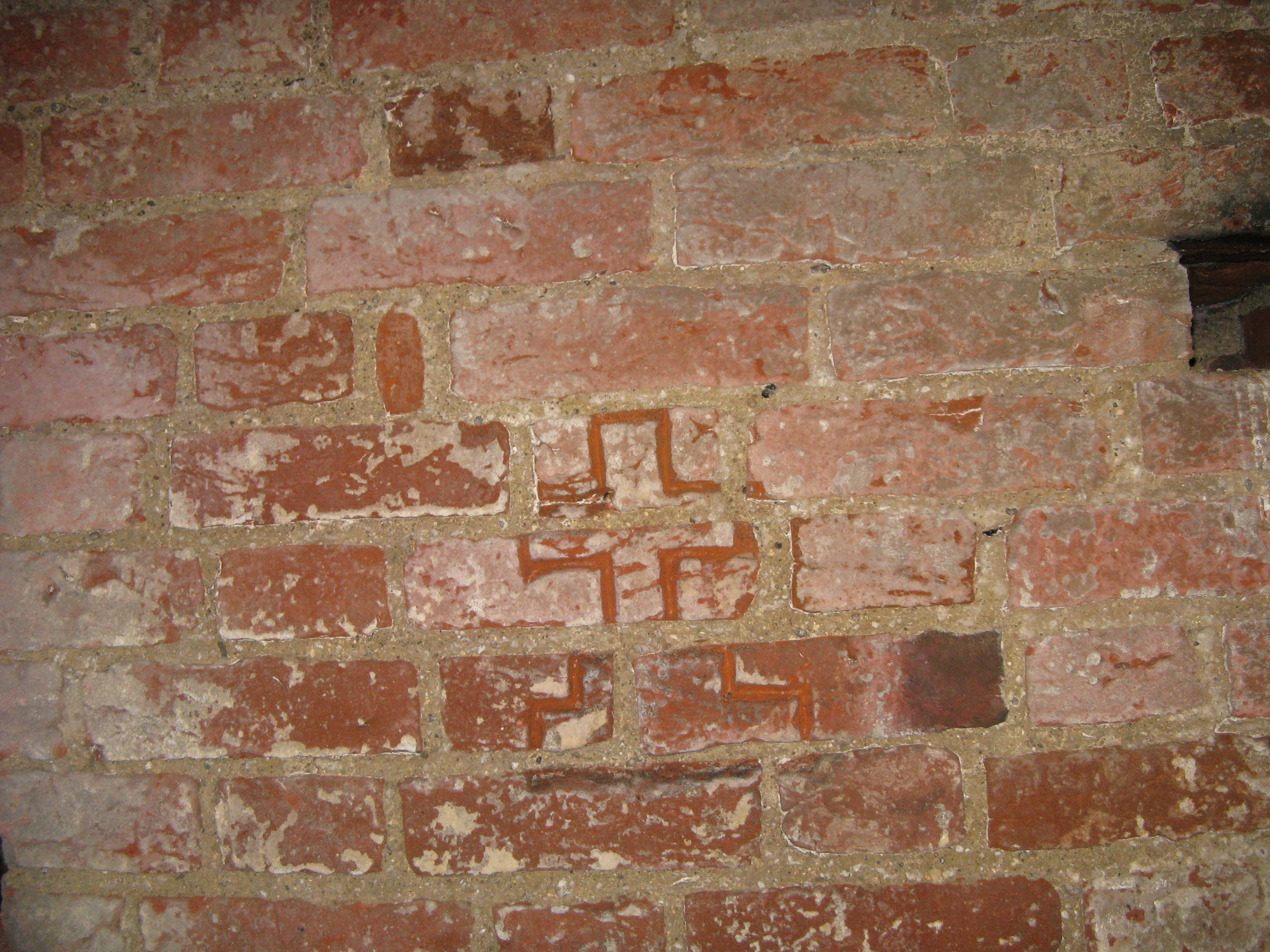 Znak templariuszy wykonany w zamku krzyżackim w Radzyniu Chełmińskim na potrzeby serialu Samochodzik i templariusze